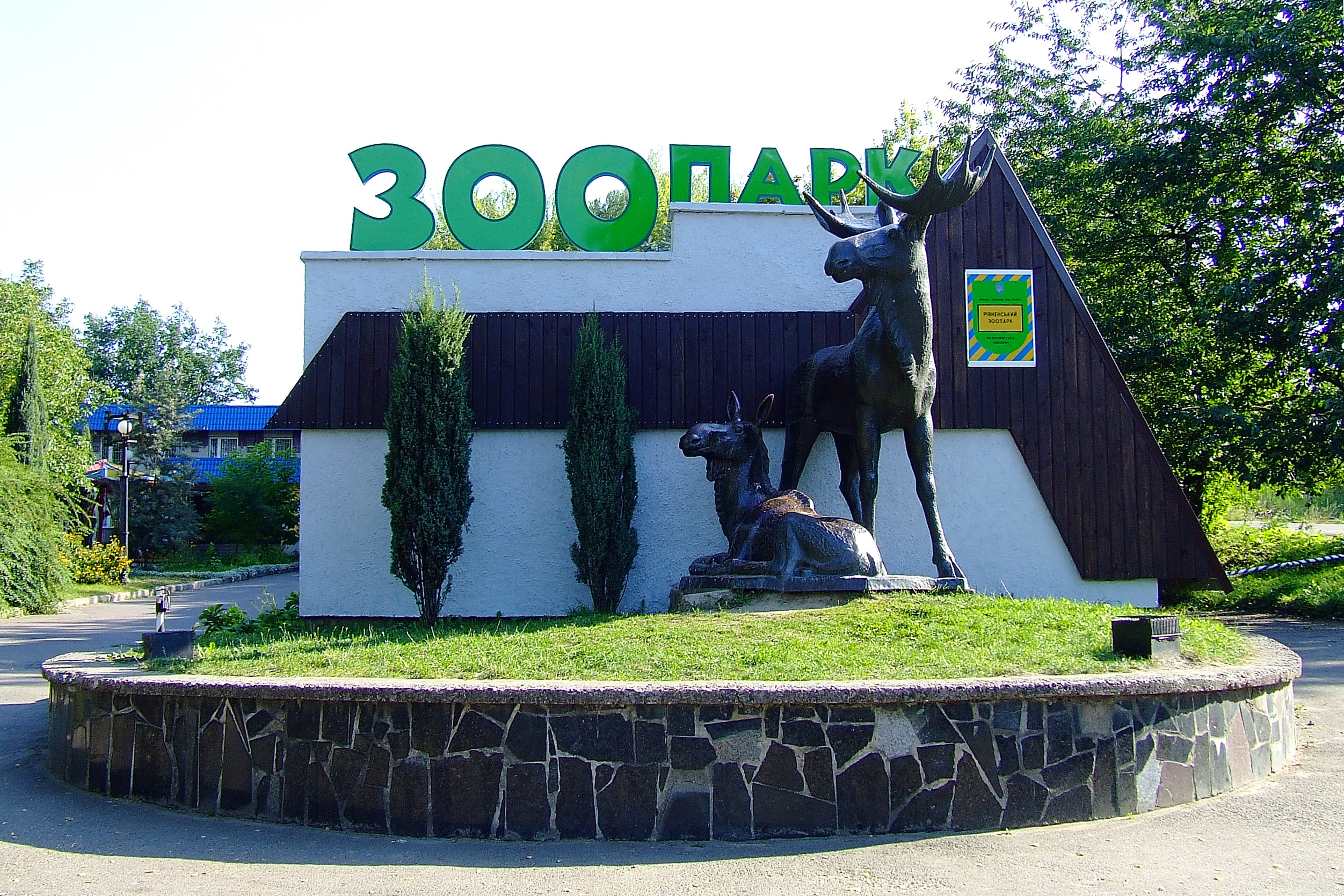 Рівненський зоопарк